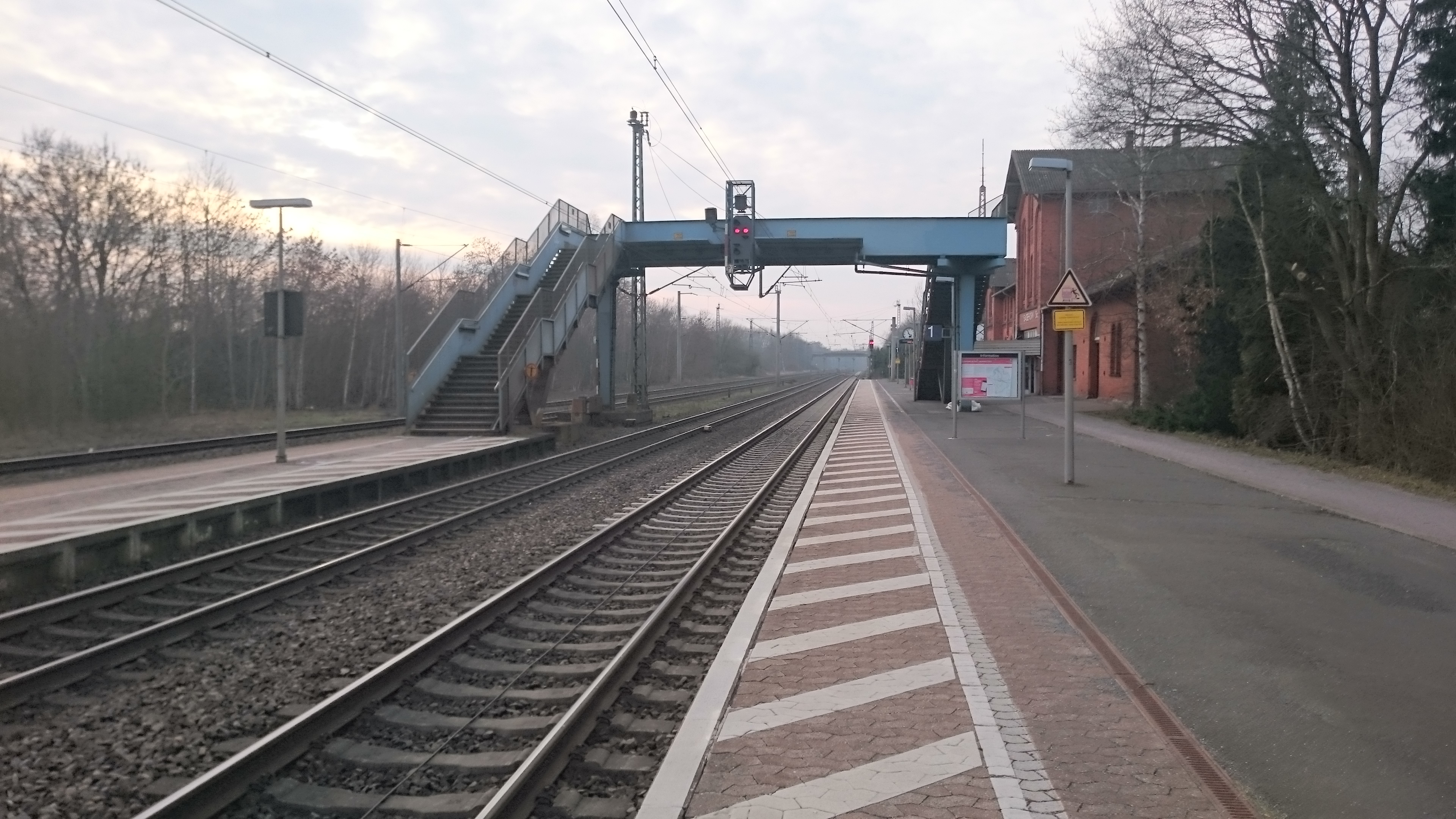 Bahnhof Sagehorn, Blick nach Bremen und aufs Bahnhofsgebäude